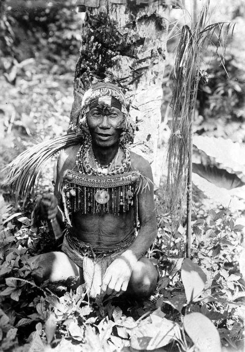 Repronegatief. Een medicijnman van Sabiroet, Mentawai-eilanden